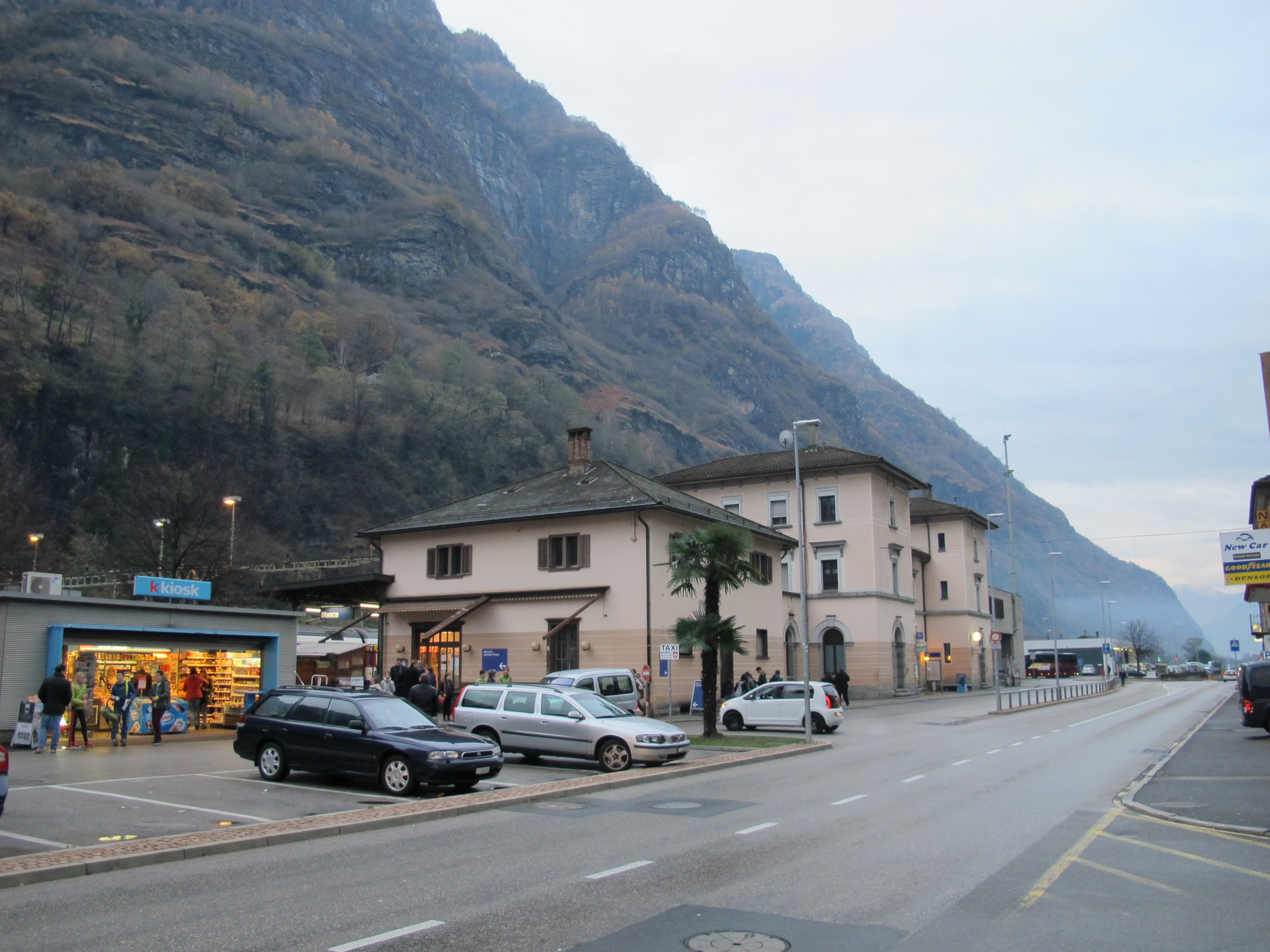 Bahnhofsgebäude von Biasca